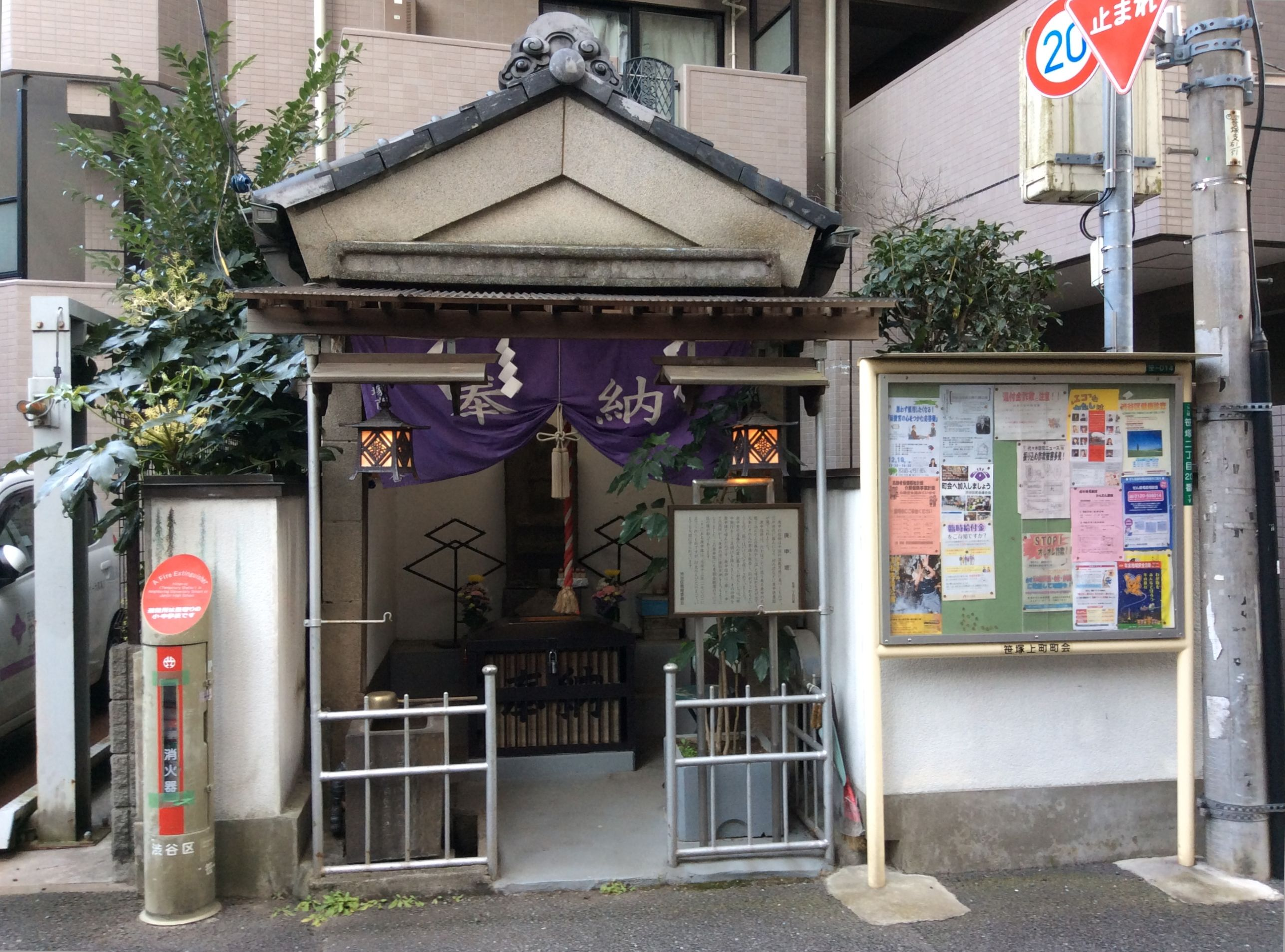 （2014年12月撮影）